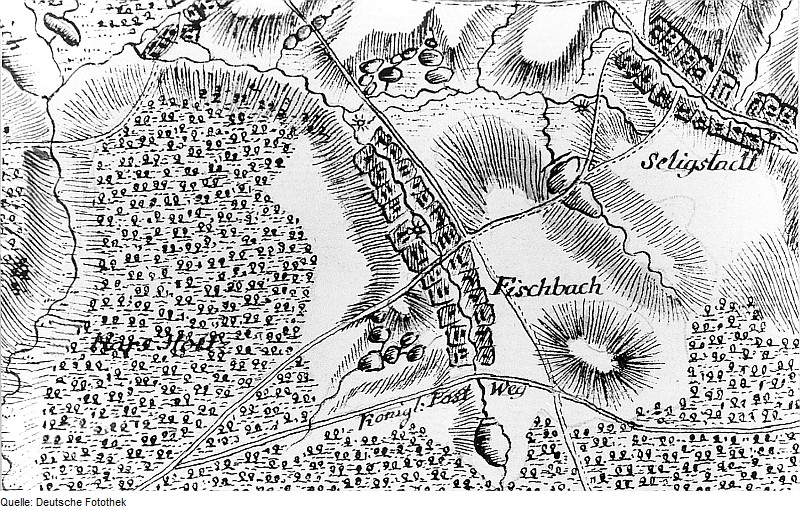 Original image description from the Deutsche Fotothek Arnsdorf-Fischbach. Karte von einem Teil des Kurfürstentums Sachsen, Petri, nach 1759 (Sign.: VII 63)